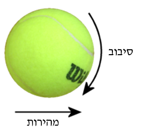 סחרור עילי